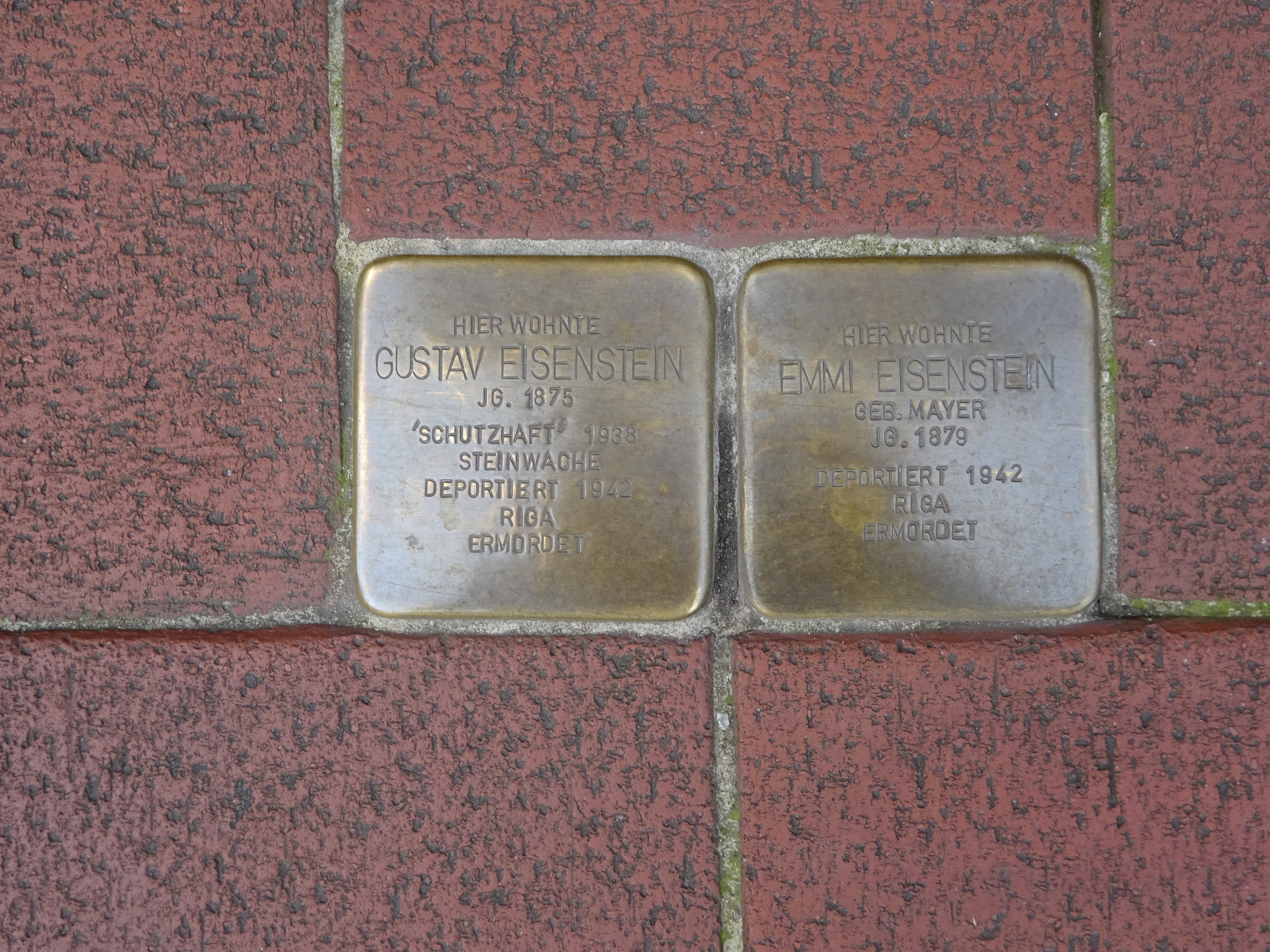 Stolpersteine Harkortstraße 71a in Dortmund